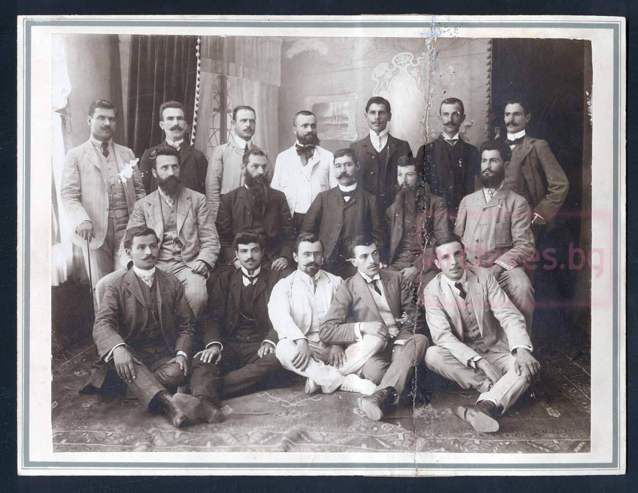 Горе: Стефан Чавдаров, Добре Даскалов, Мише Анчев, Иван Караджов, Запрянов, Михаил Дорев, Борис Мончев. Среда: Петър Ацев, Петър Кушев, Христо Матов, Тодор Лазаров, Тодор Александров. Долу: Стоян Мишев, Григор (Гешо) Илиев, Петко Пенчев, Христо Саракинов и Георги Занков.